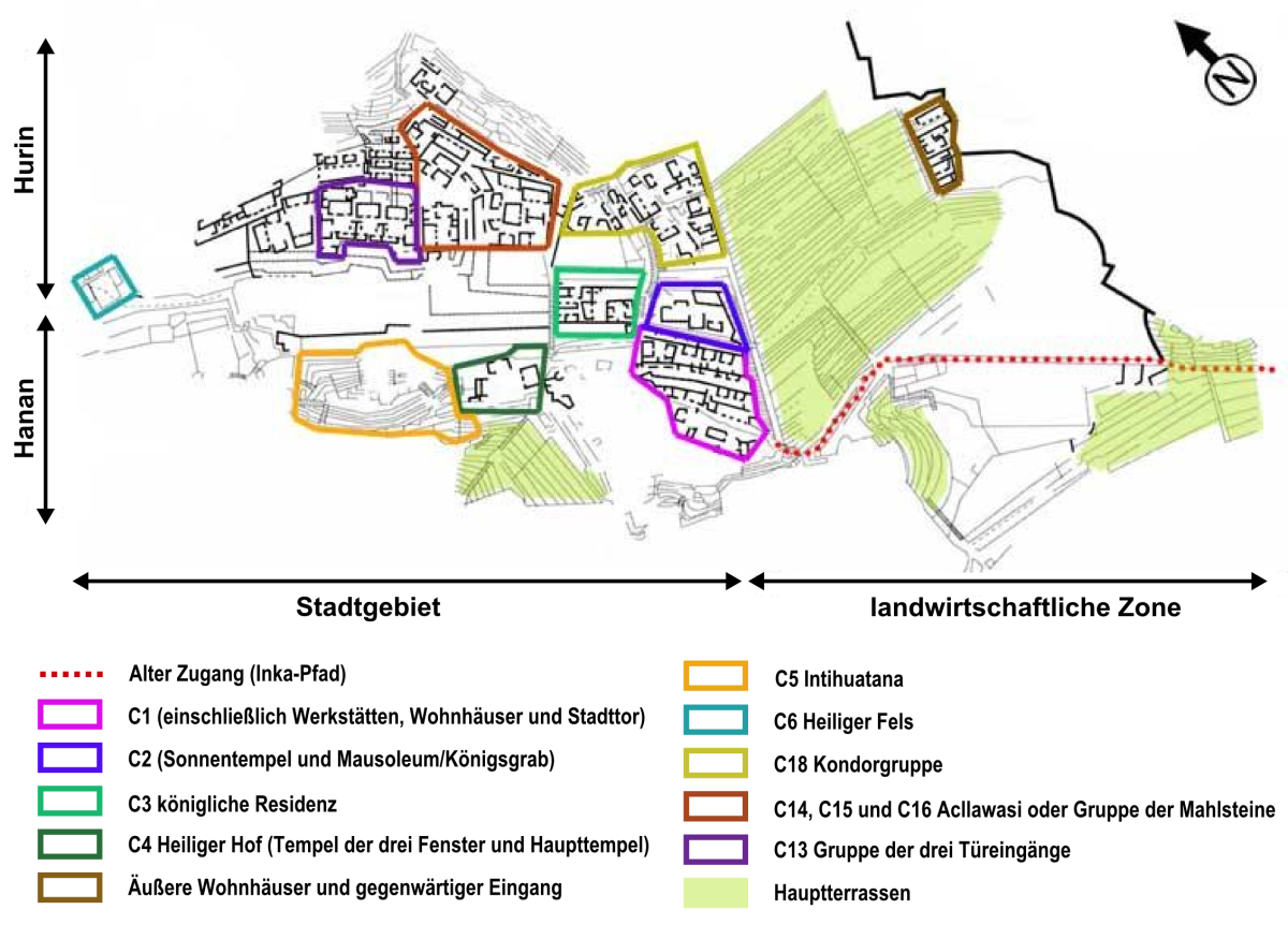 Deutsche Version einer Karte von Machu Picchu